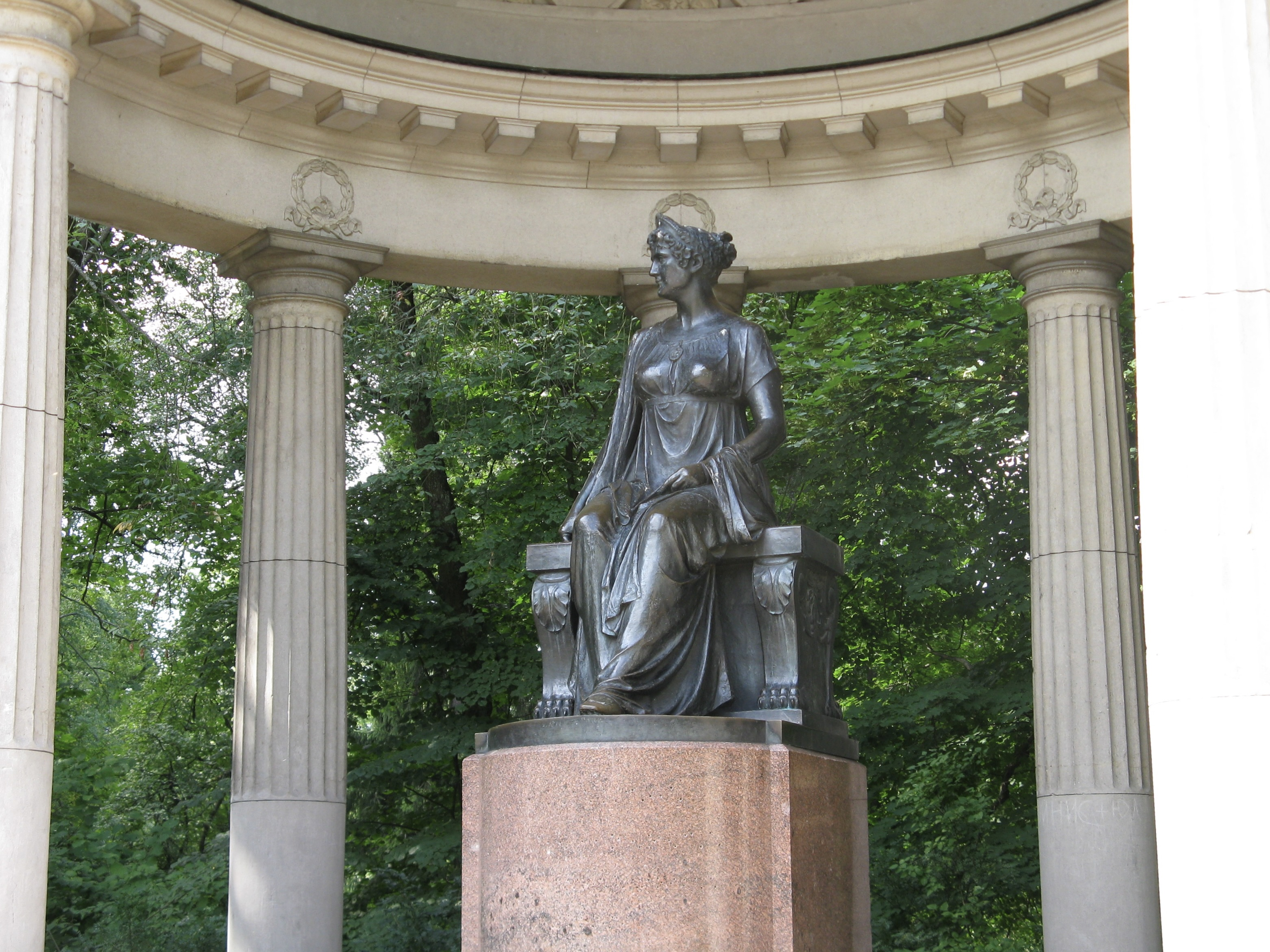 Павильон Росси (памятник императрице Марии Федоровне) (Санкт-Петербург и Лен.область, Павловск, центральный район парка)